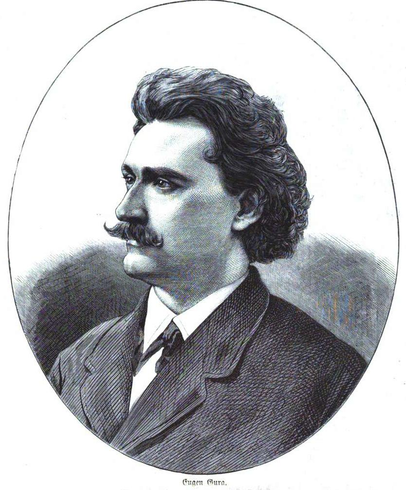 Eugen Gura (1842-1906), österreichischer Opernsänger.